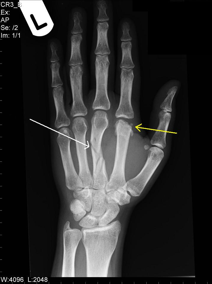 הקובץ המקורי נערך והועלה מחדש